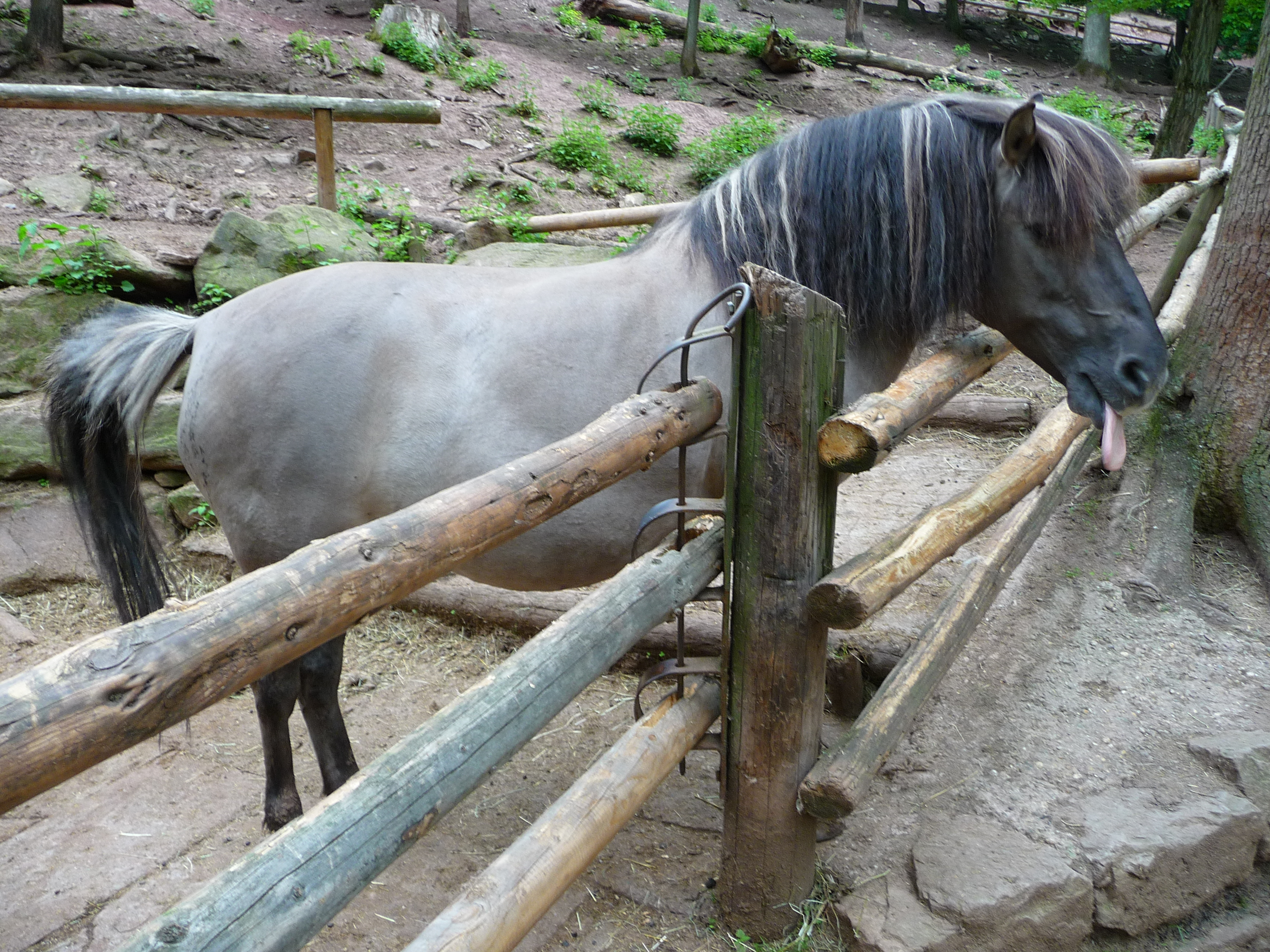 Rückzüchtung Tarpan, hier eine Stute im Wildpark Tripsdrill (Baden-Württemberg, Deutschland)